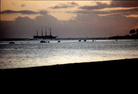 Oahu